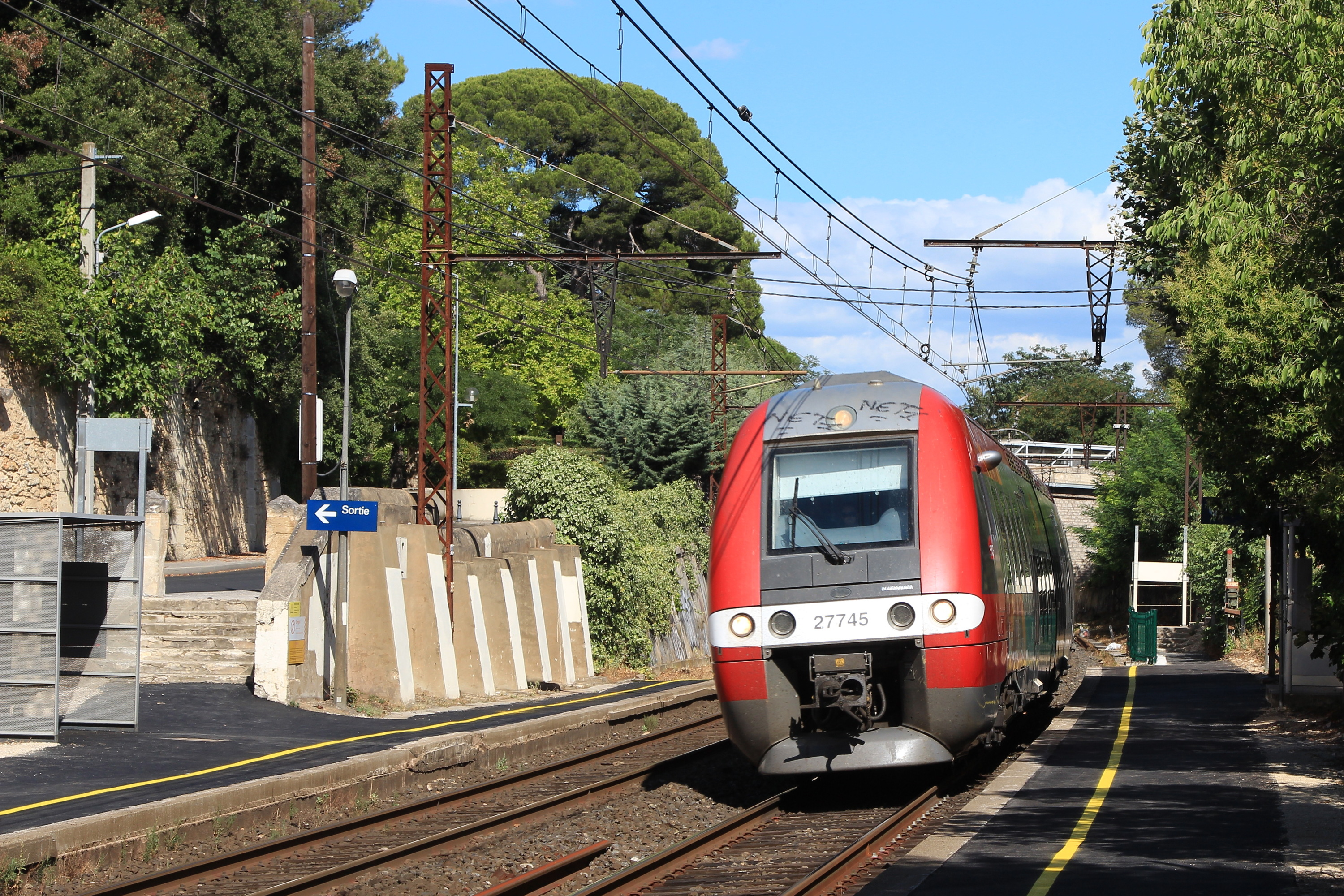 La ZGC n° 27745 assurant le TER 876611 (Nîmes - Narbonne) passe sans arrêt en gare de Saint-Aunès.